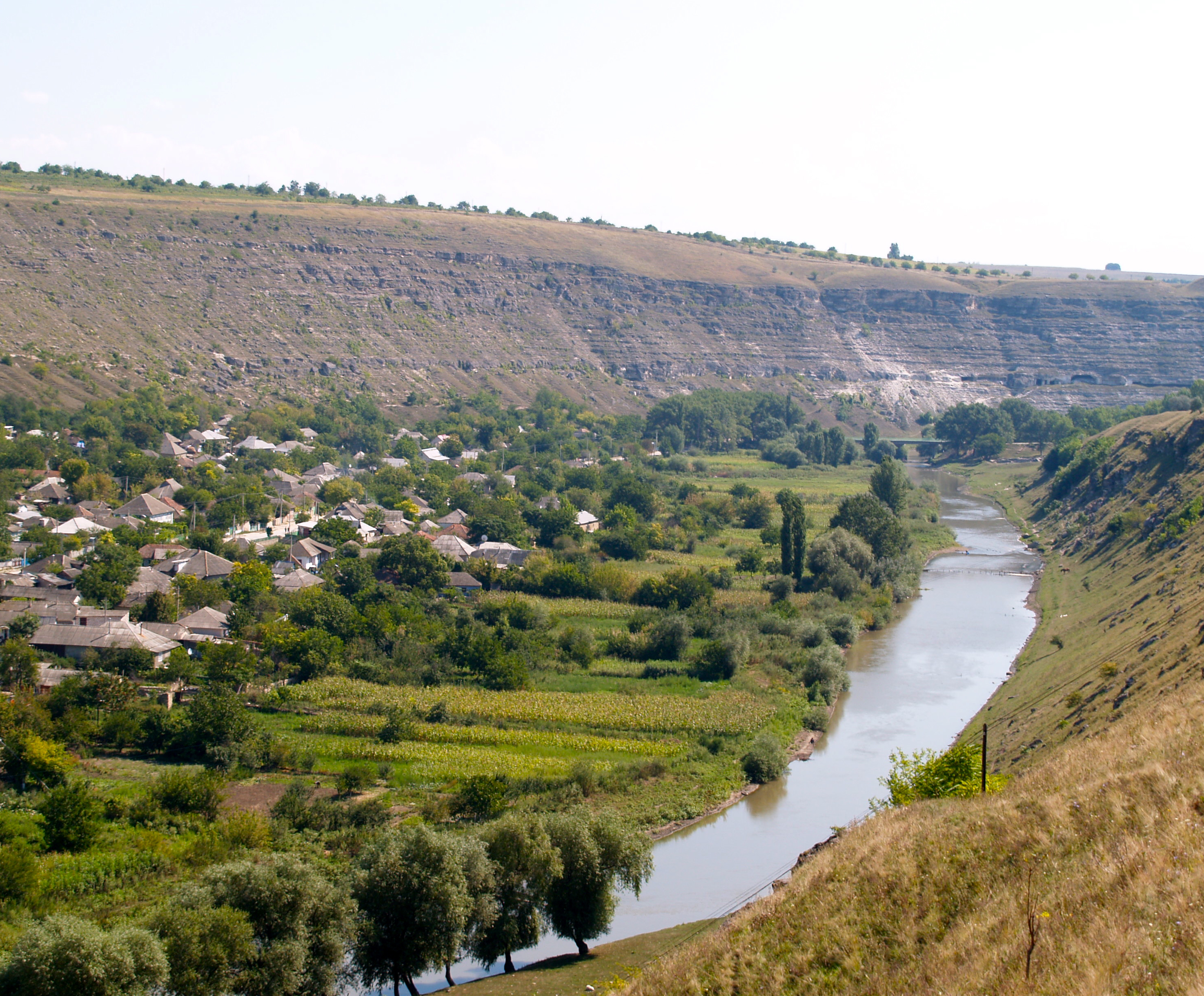 Orhei Vechi, Moldova